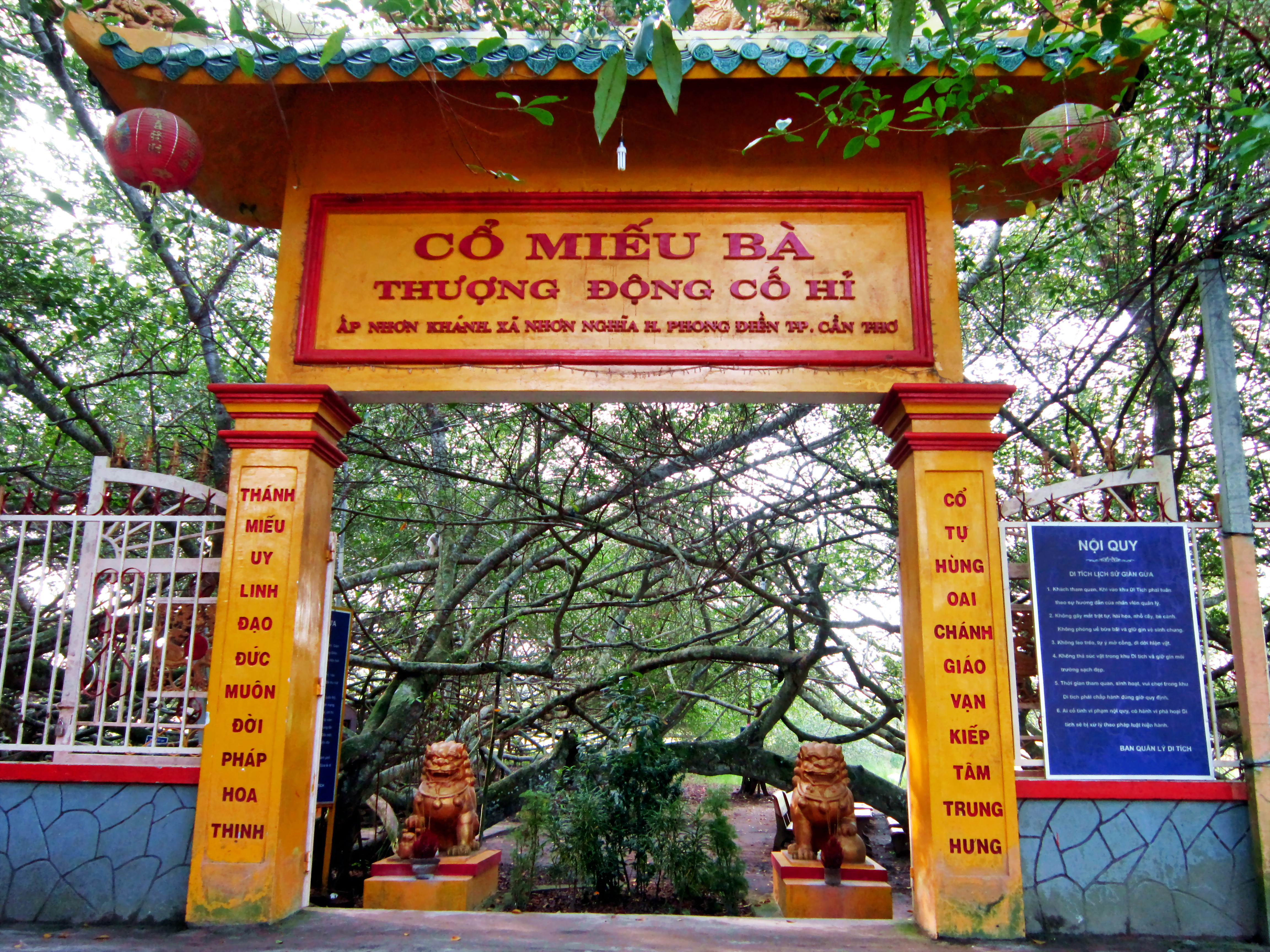 Cổng miếu thờ bà Thượng Động Cố Hỷ ở ấp Nhơn Khánh, xã Nhơn Nghĩa, huyện Phong Điền, thành phố Cần Thơ, Việt Nam.